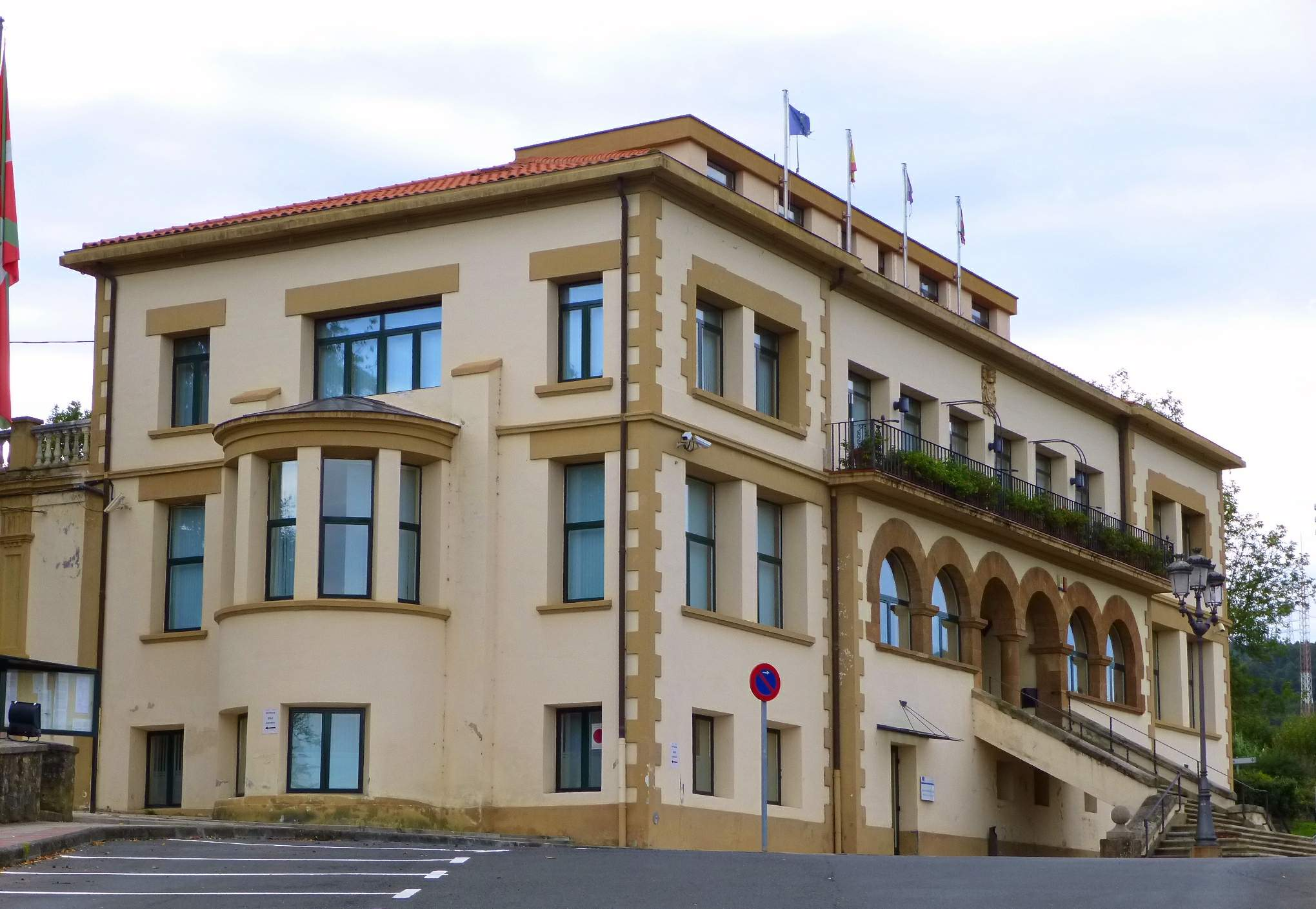 Ayuntamiento de Muskiz (Vizcaya)